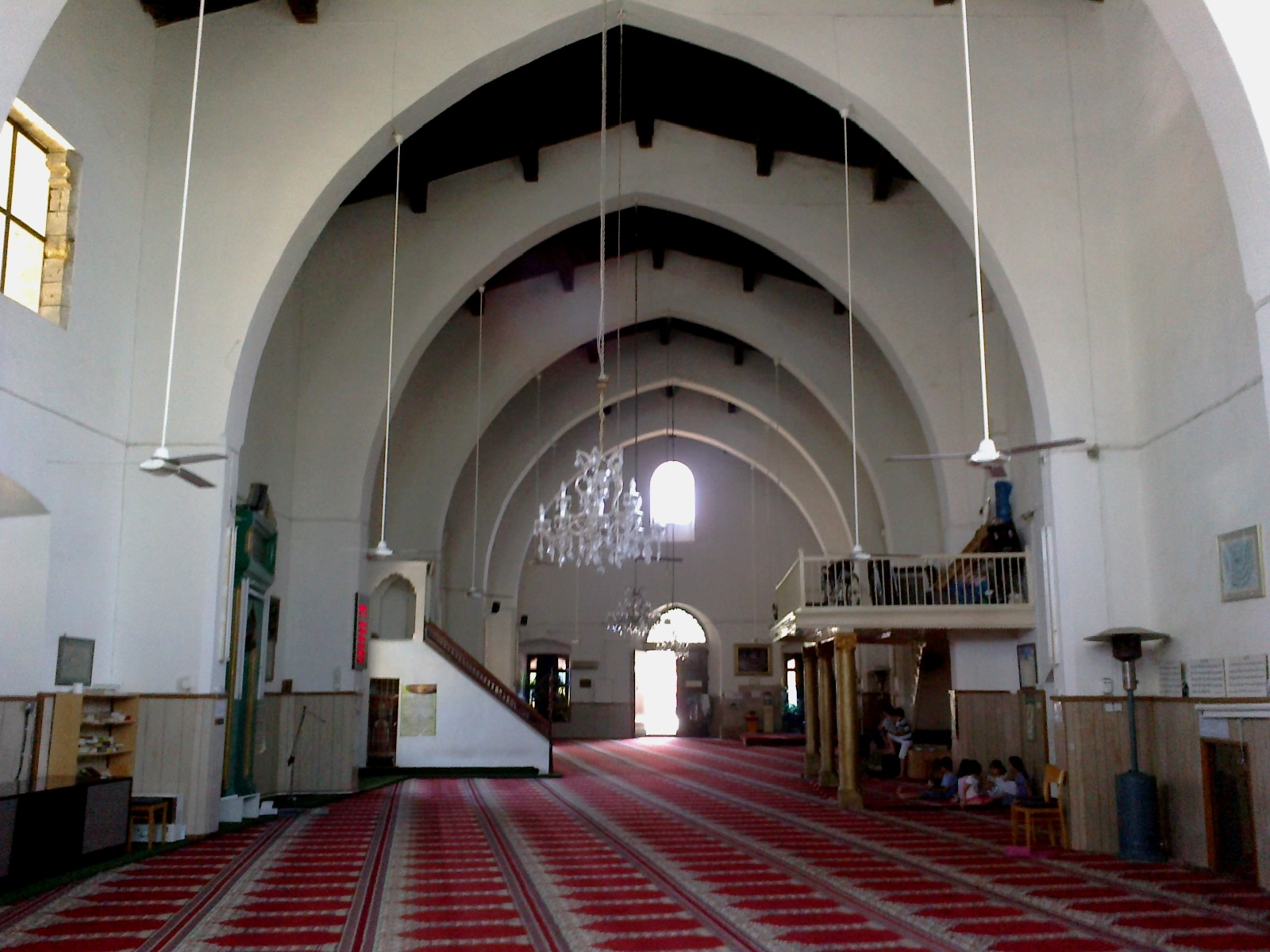 Chypre Nicosie Mosquee Omeryie Nef